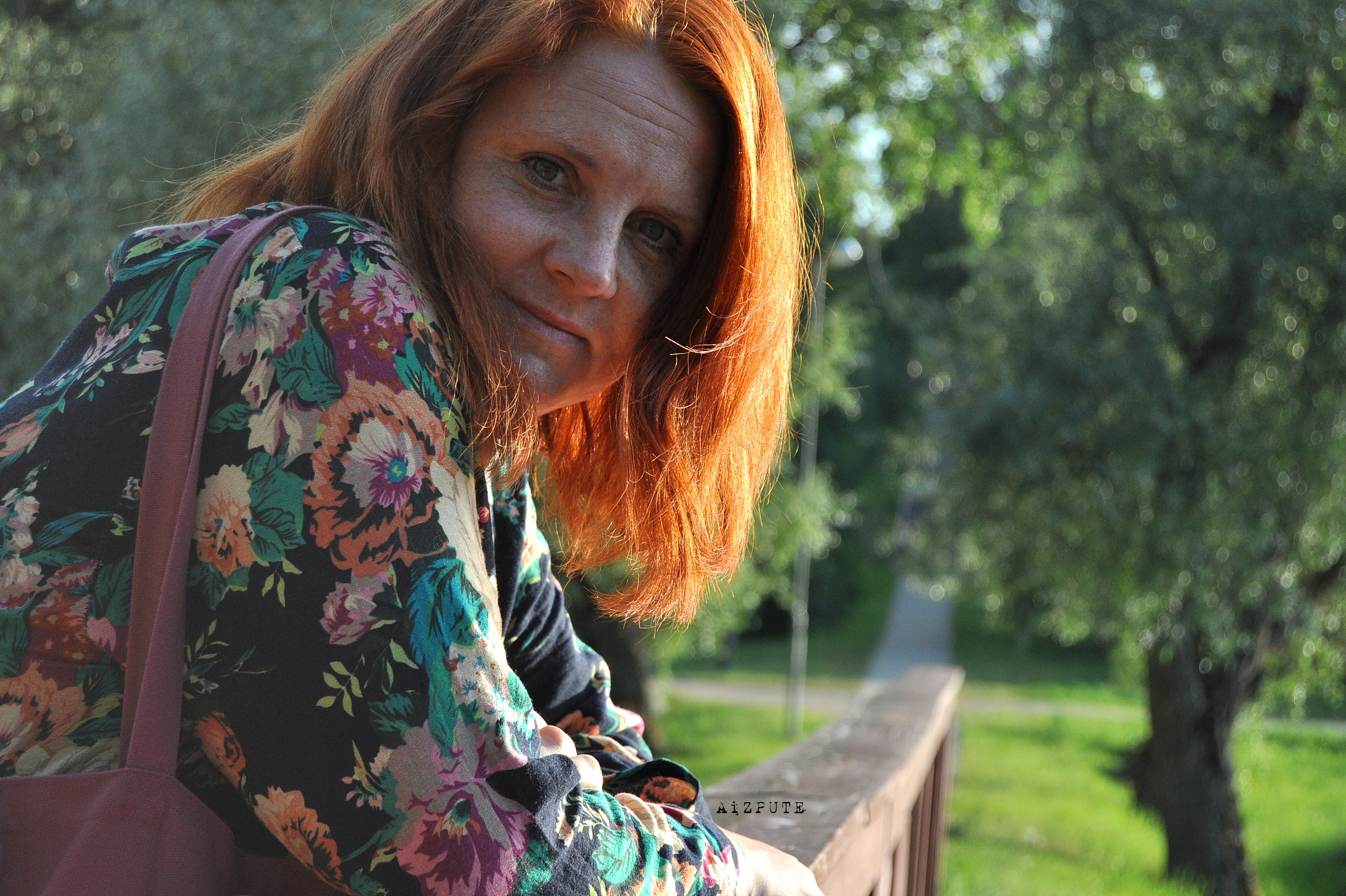 Agnese Rudzīte 2018. gada jūlijā